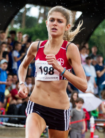 Laufgala des TSV Pfungstadt am 3. Juni 2017.